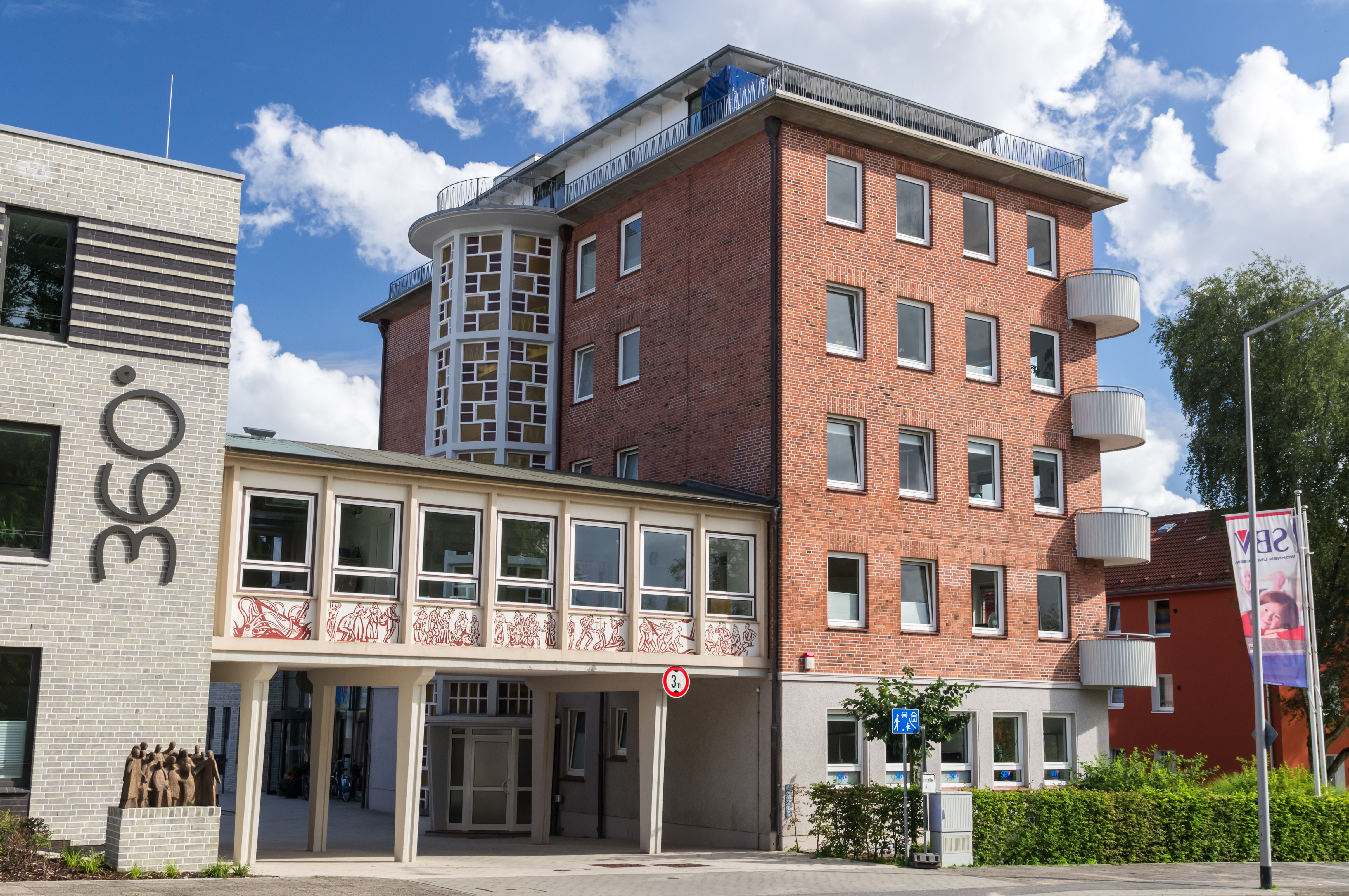 Flensburg-Fruerlund; Muerwiker Strasse 26; Wohn- und Bürohaus; Denkmal-Nr. 6